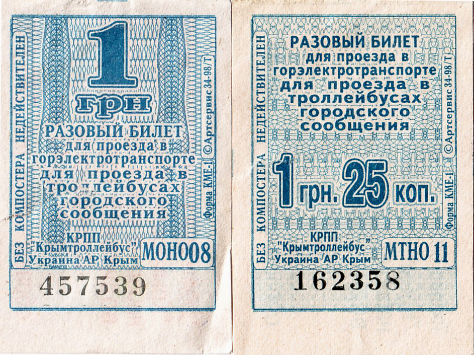 Билет на троллейбус Ялты